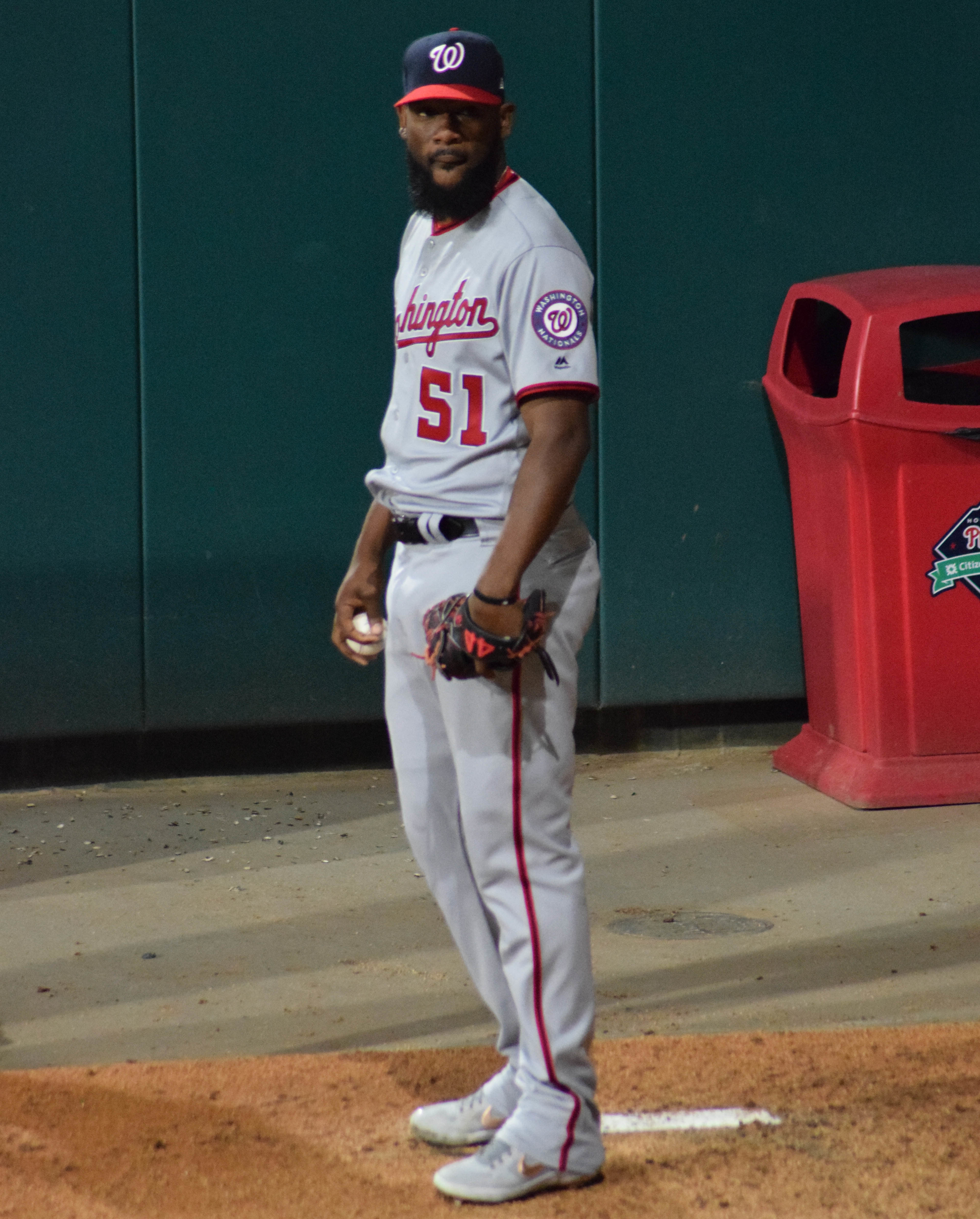 Wander Suero